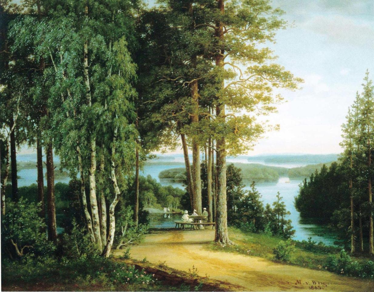 Magnus von Wrightin maisemamaalaus Punkaharjulta. Kuuluu yksityiskokoelmaan.